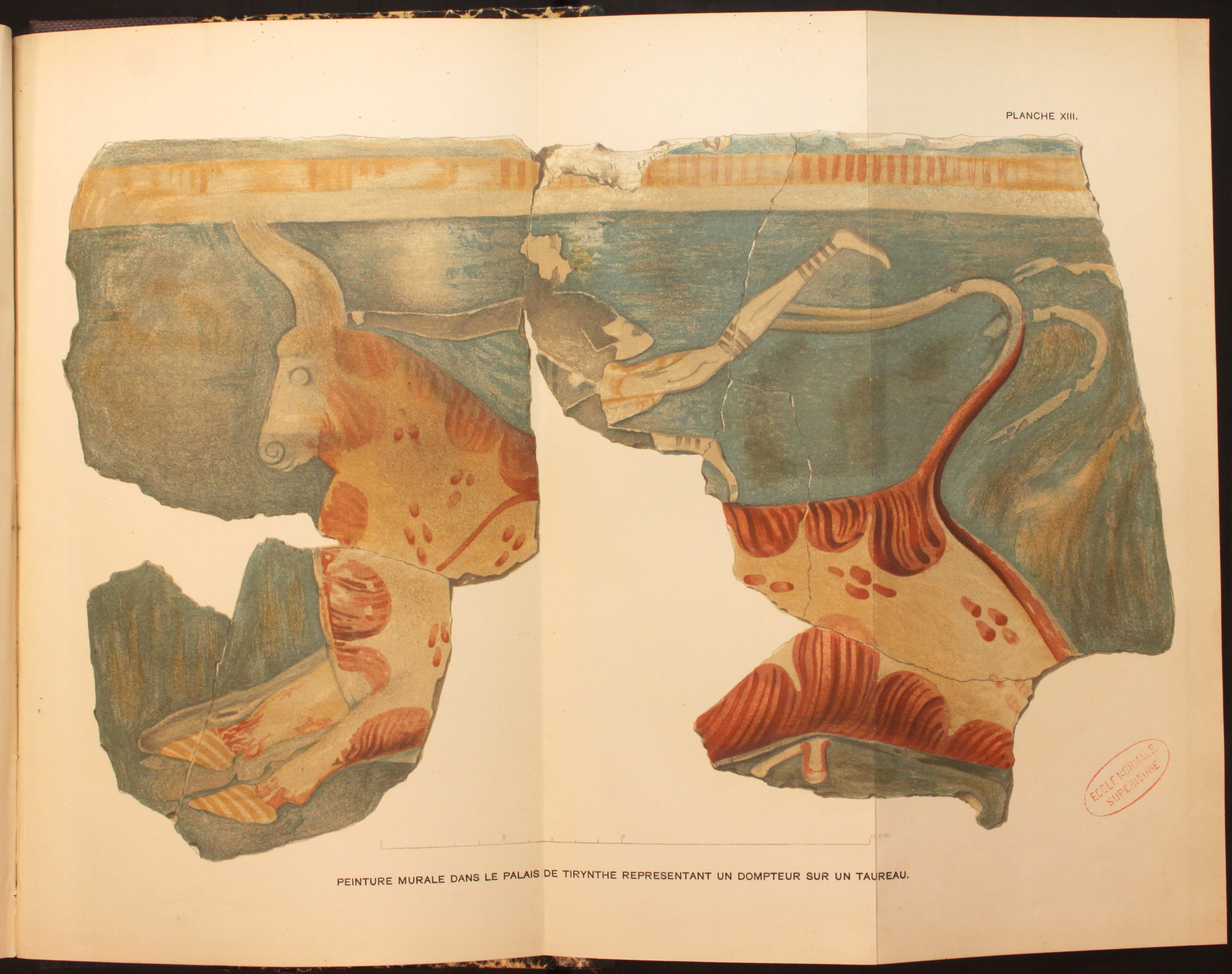 Peinture murale dans le palais de Tirynthe représentant un dompteur sur un taureau. Planche XIII de l'ouvrage dirigé par Heinrich Schliemann, "Tirynthe. Le palais préhistorique des rois de Tirynthe. Résultats des dernières fouilles", Paris, C. Reinwald libraire-éditeur, 1885.